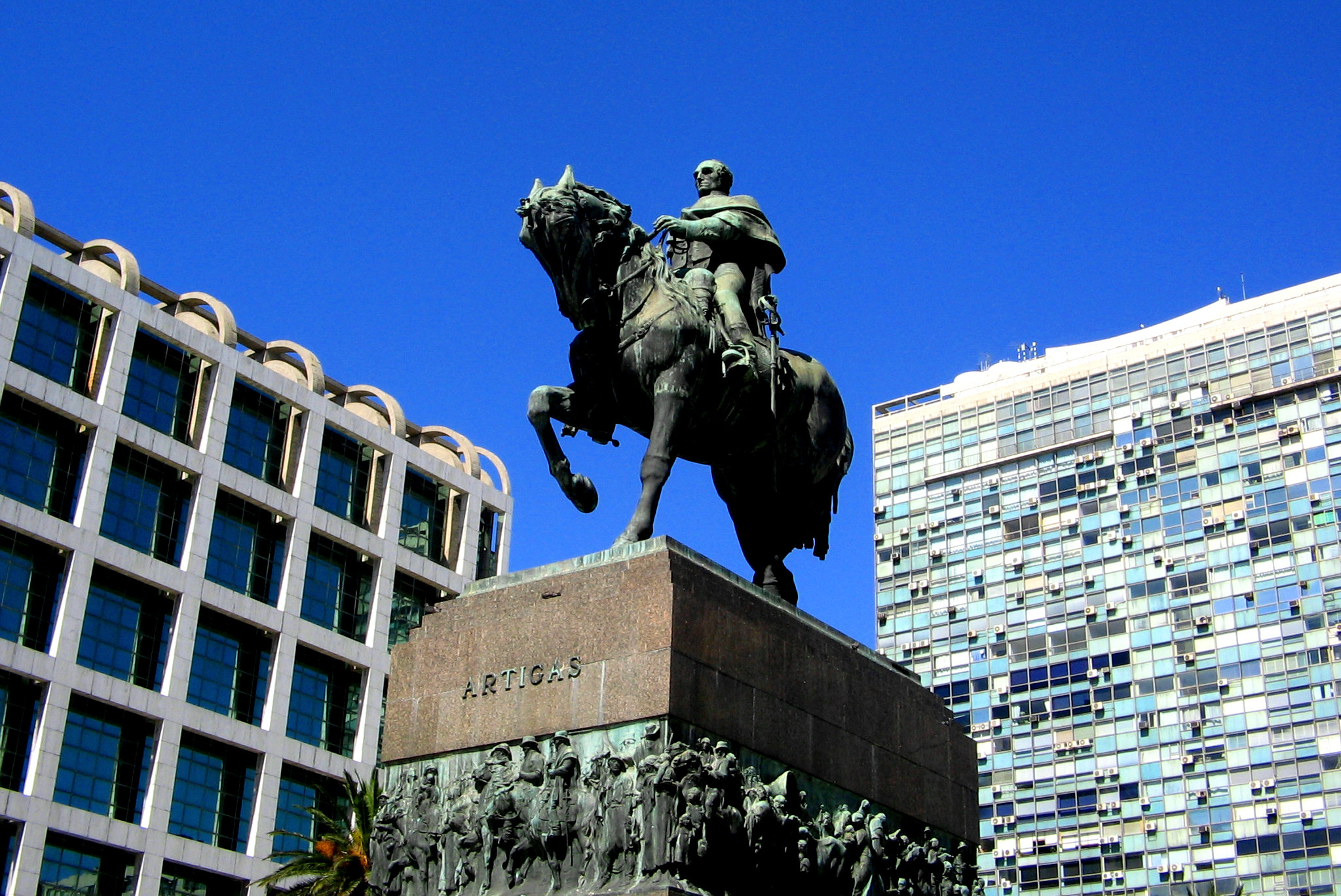 General José Artigas (estatua ecuestre de Plaza Independencia). Ubicada en el departamento de Montevideo